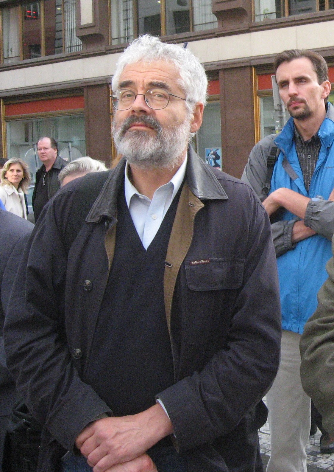 Leo Pavlát